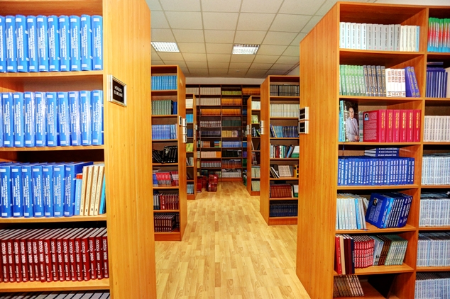 Tefekkur